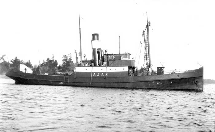 Bogserbåt "Ajax" Byggd 1904 vid Porsgrunds Mek. Verksted AS, Porsgrund. (Stål) 29,71 x 5,60 x 3,17 m. - 119,16/28,11 (SS 1955) Maskin: Varvets comp.ångmaskin på 400 IHK.